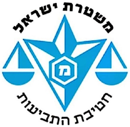 סמל חטיבת התביעות במשטרת ישראל